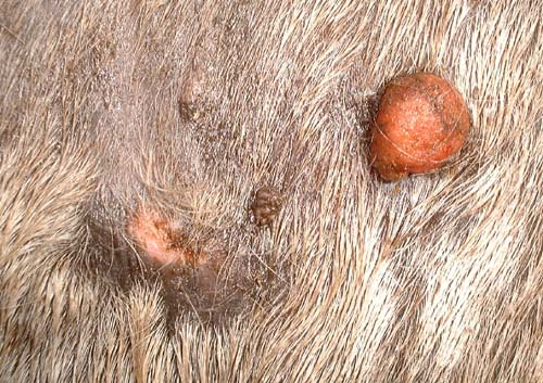 Equine sarcoid,sarkoid u konia